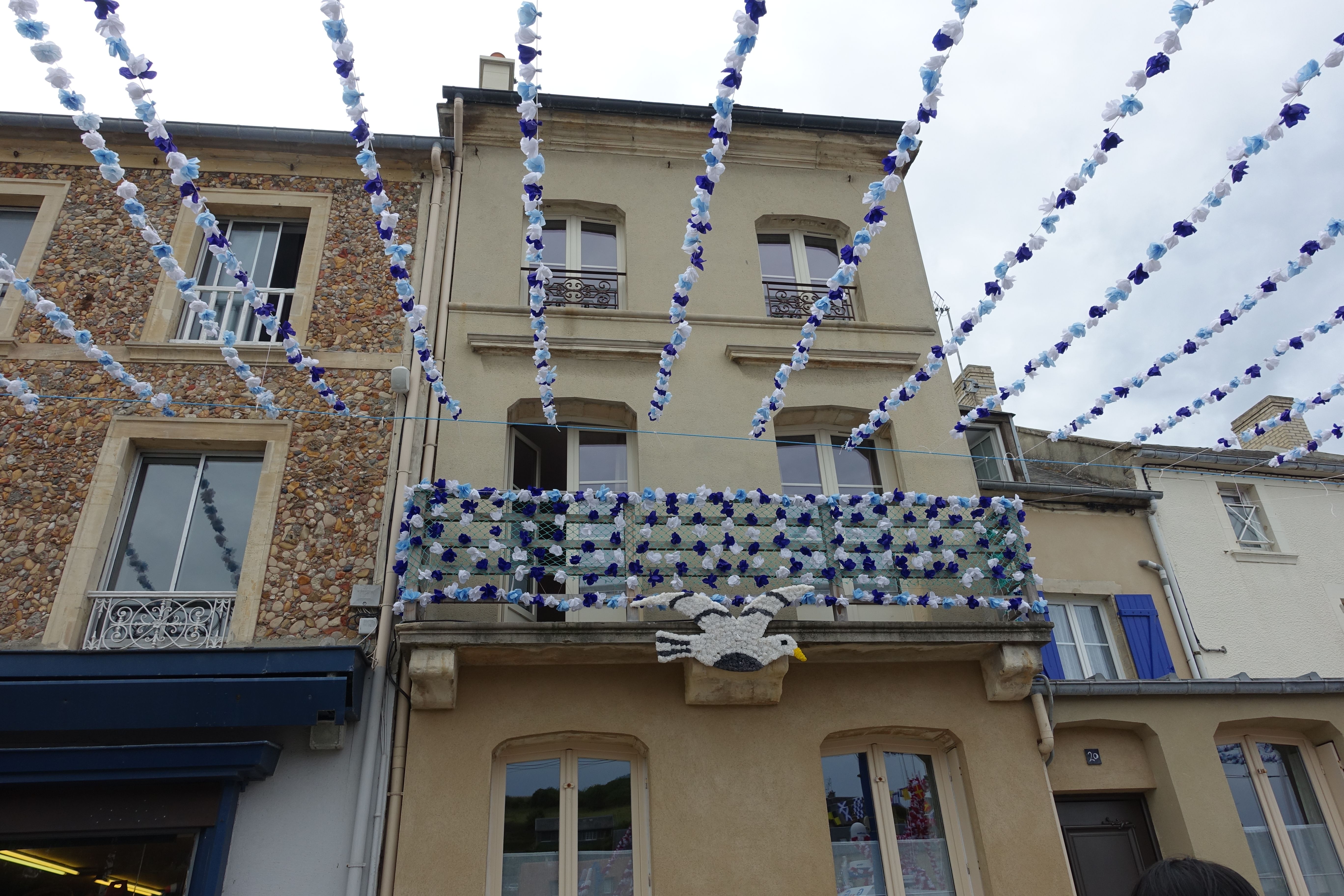 Port en Bessin, tijdens het feest Benediction de la Mer